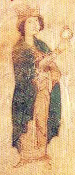 Konstancie Sicilská